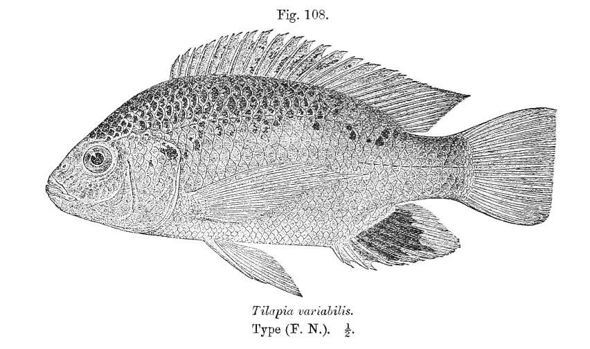 Oreochromis variabilis